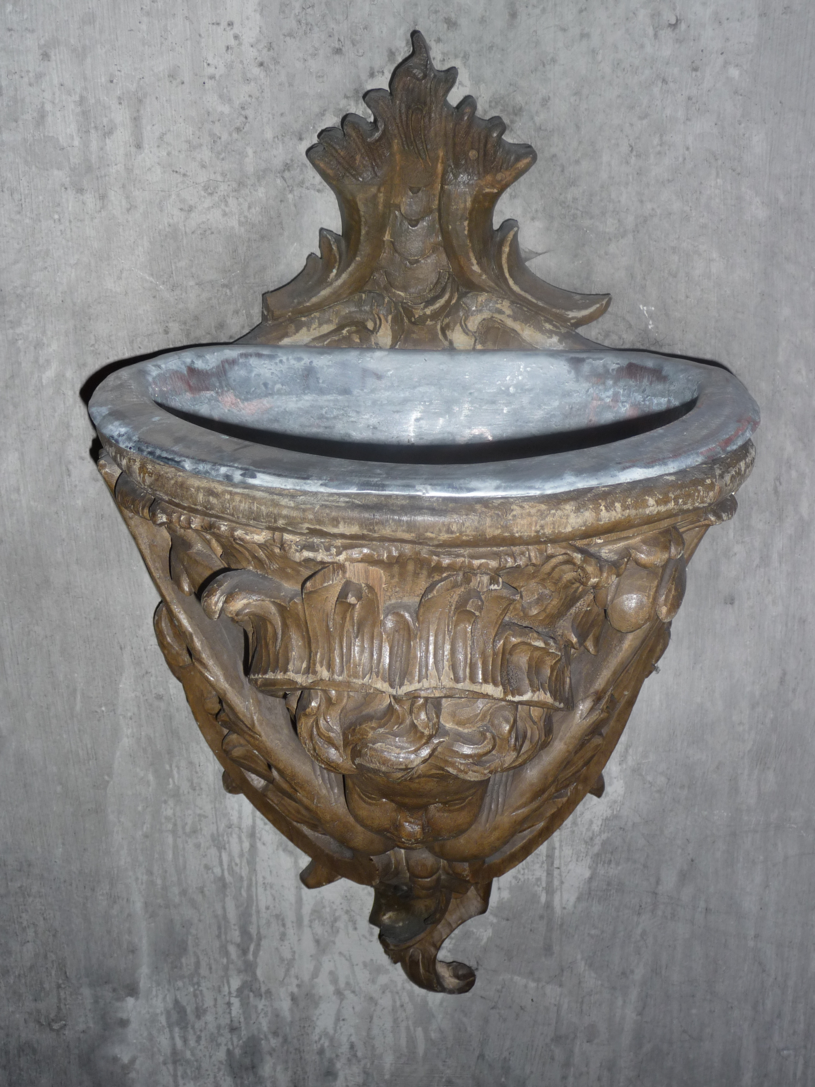 Weihwasserbecken (um 1752 von Martin Eigler aus Ettlingen aus Holz geschnitzt) in der Stiftskirche in Baden-Baden (Baden-Württemberg, Deutschland)